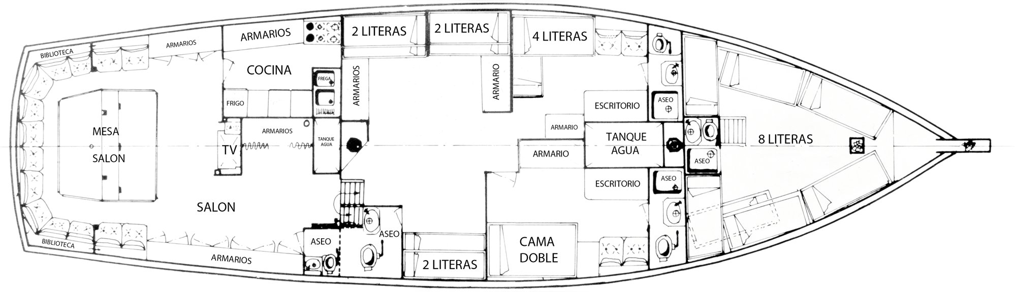 Planos de la holeta